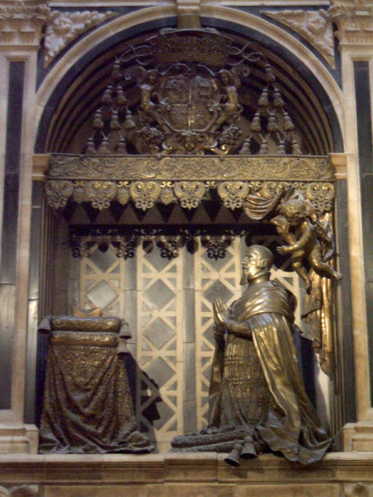 Burgos - Catedral - Capilla de San Enrique